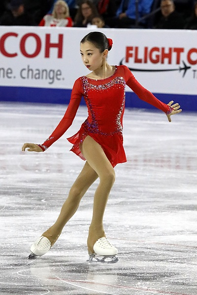 Элизабет Турсынбаева на этапе Гран-при в Канаде (2018)